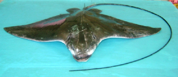 Aetobatus flagellum, скат рода орляковых скатов